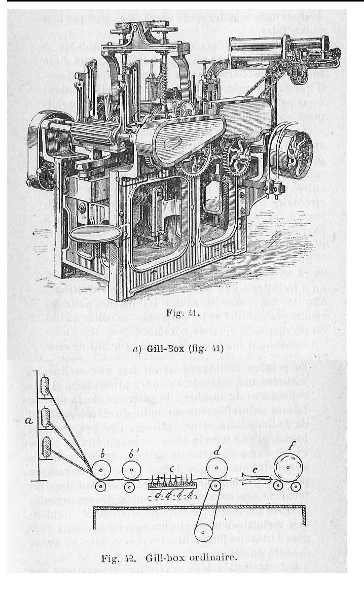 Gill-box - dessin & schéma